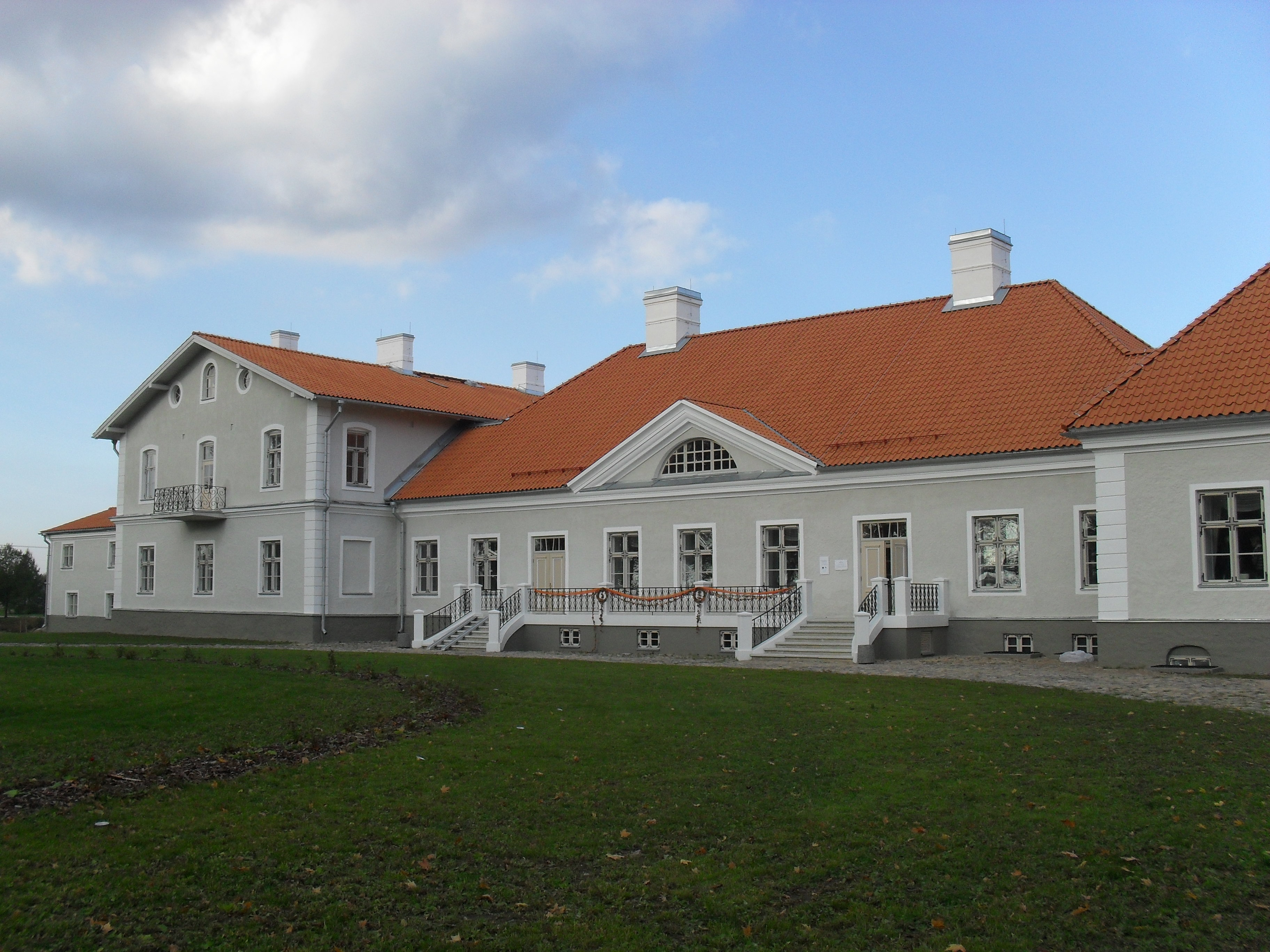 Kukruse mõisa peahoone, 18.-19. sajand